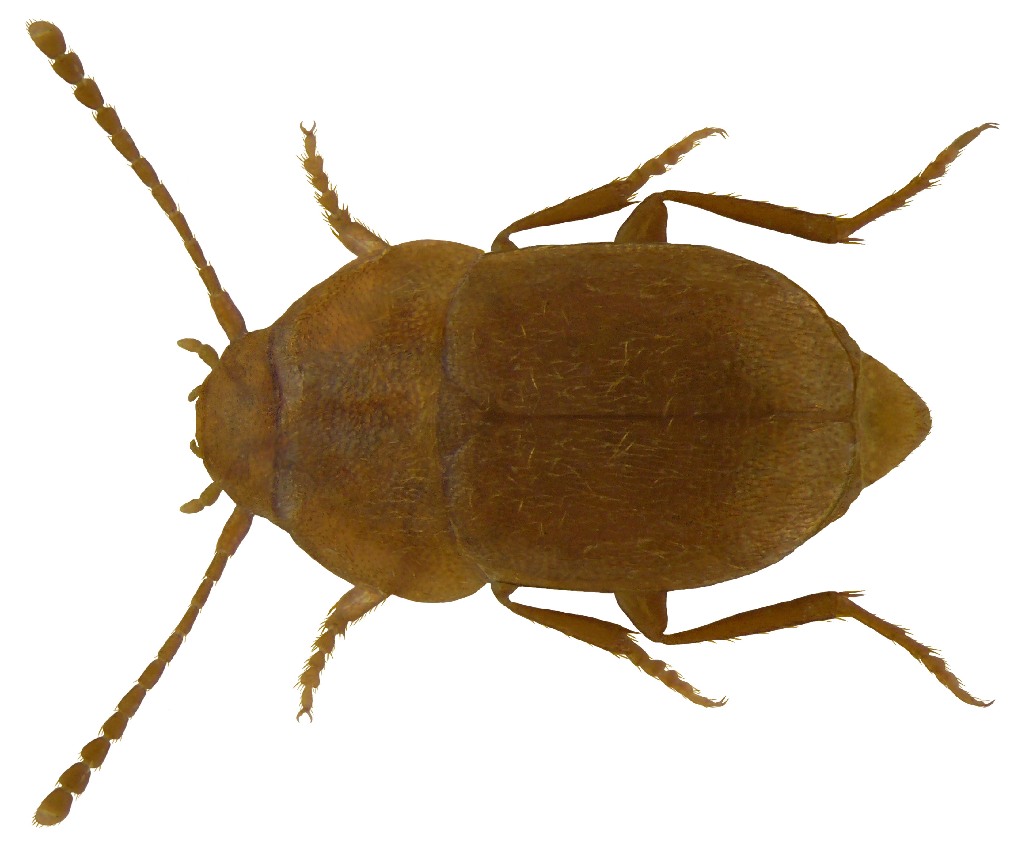 Familie: Leptinidae Grösse: 2-2,2 mm Verbreitung: Europa, Nordamerika Ökologie: in Kleinsäugernestern Fundort: Germania, Mecklenburg, Parkentin Hütter leg. F.Wolf, 1990; det. A.Weigel, 2002 Foto: U.Schmidt, 2009